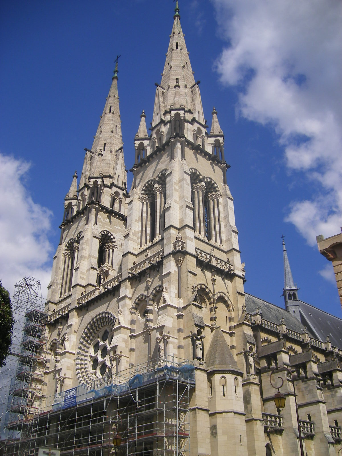 Cathédrale Notre-Dame de Moulins